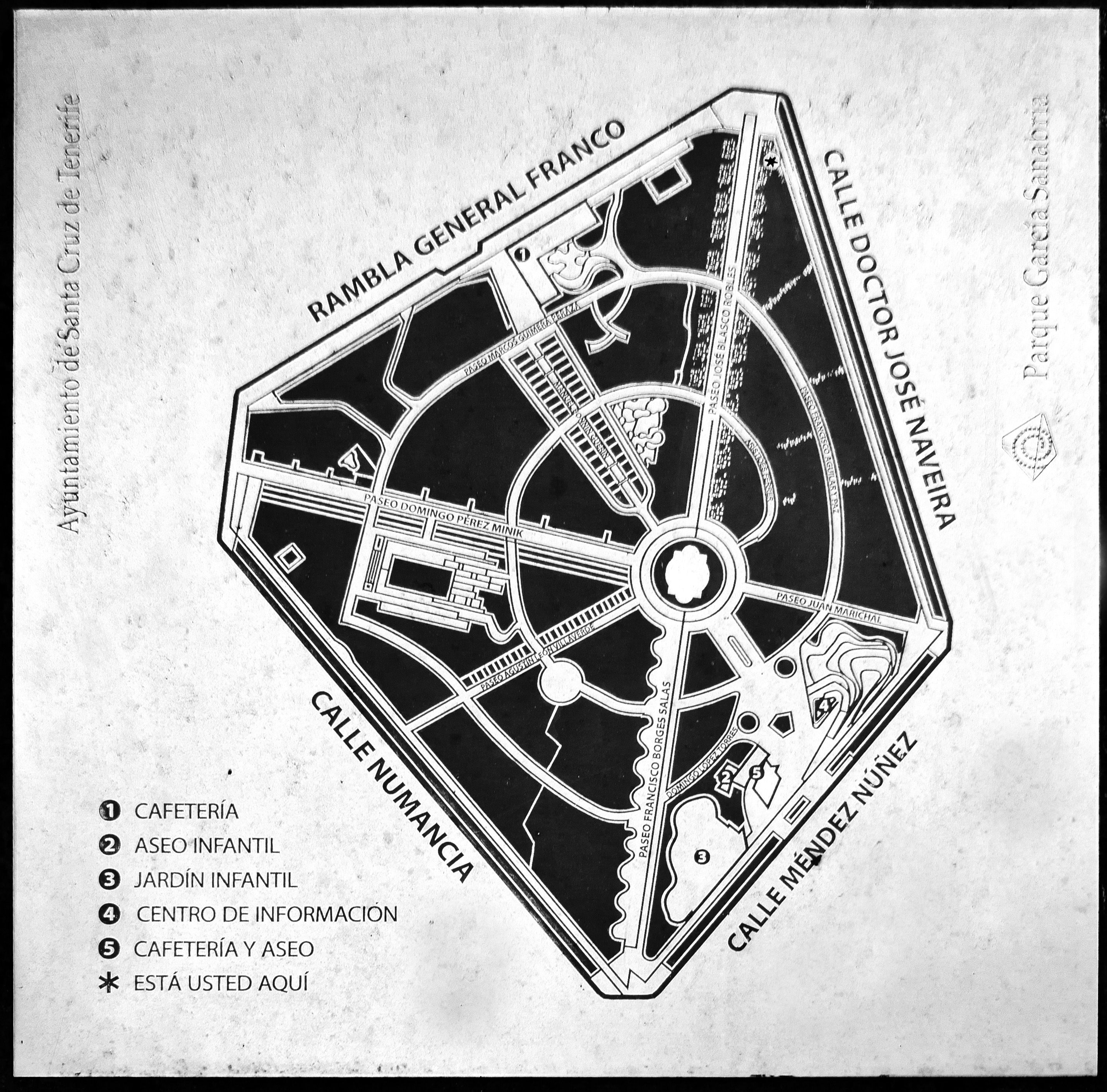 Plan des Parque Municipal García Sabrina wie er 2012 an den Eingängen dargestellt wird.